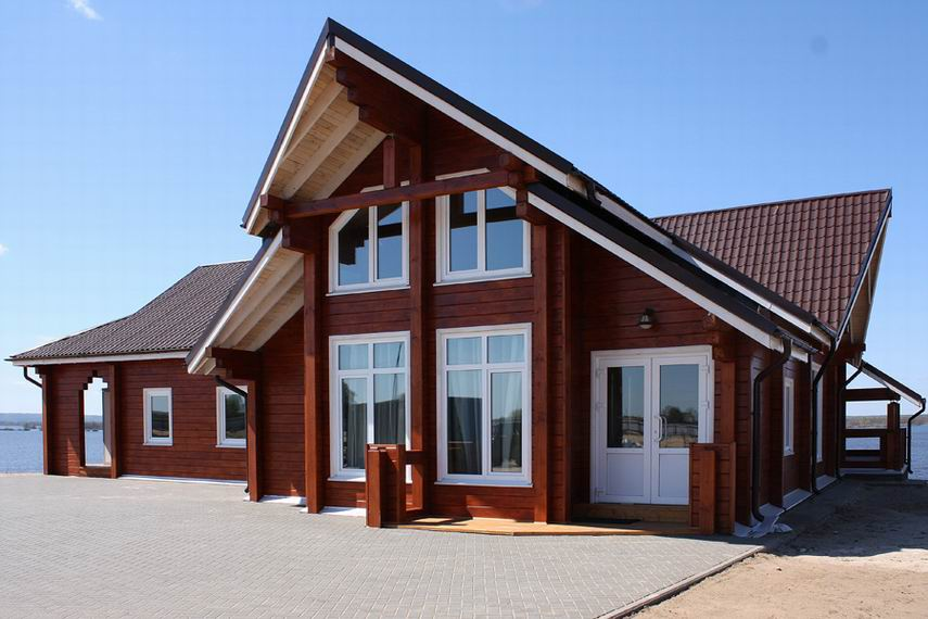 Многофункциональный дом с бильярдом на тур-базе "Заводь" в Разнежье